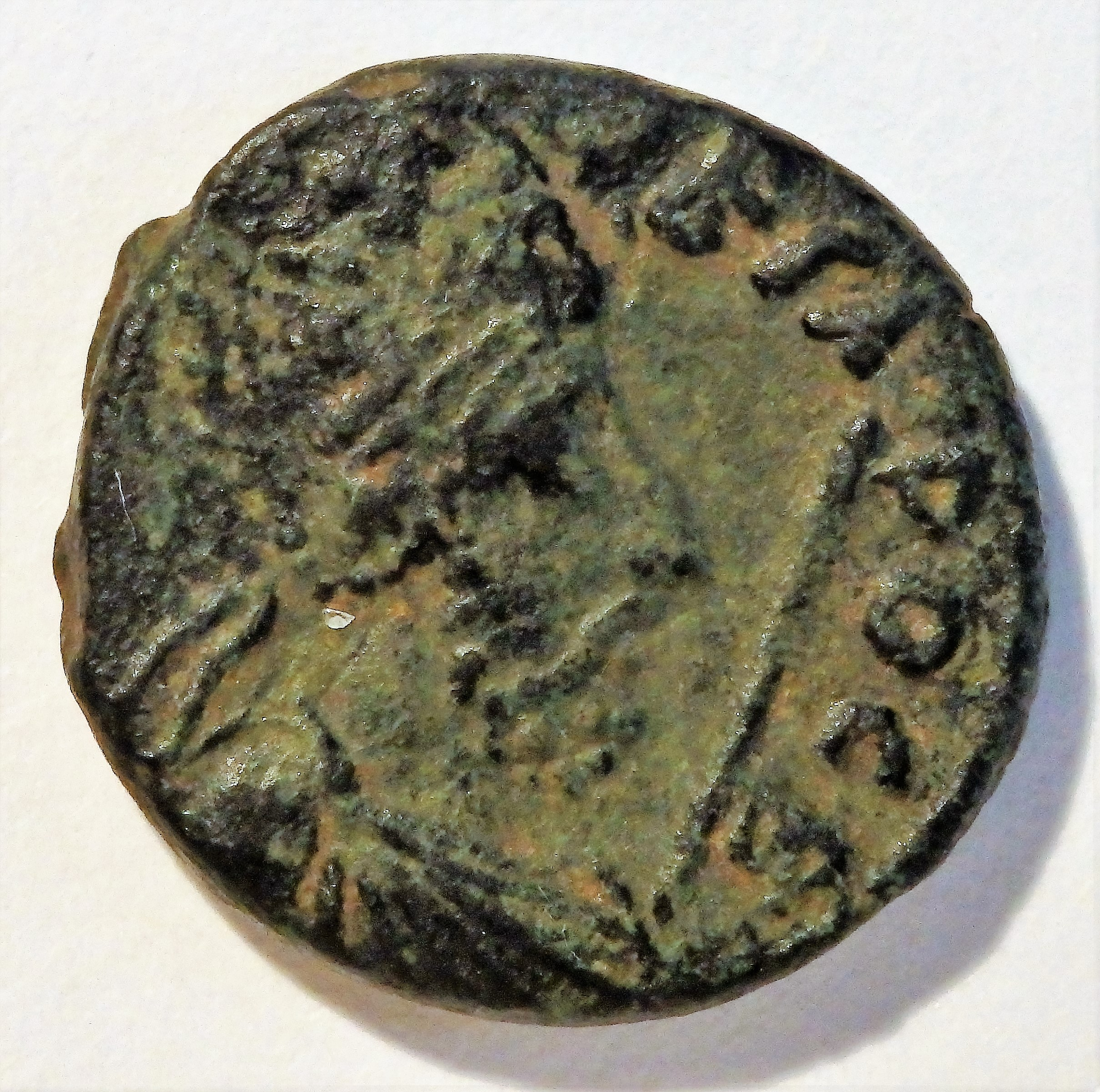 Rückseite der Bronzemünze Abgars VIII.